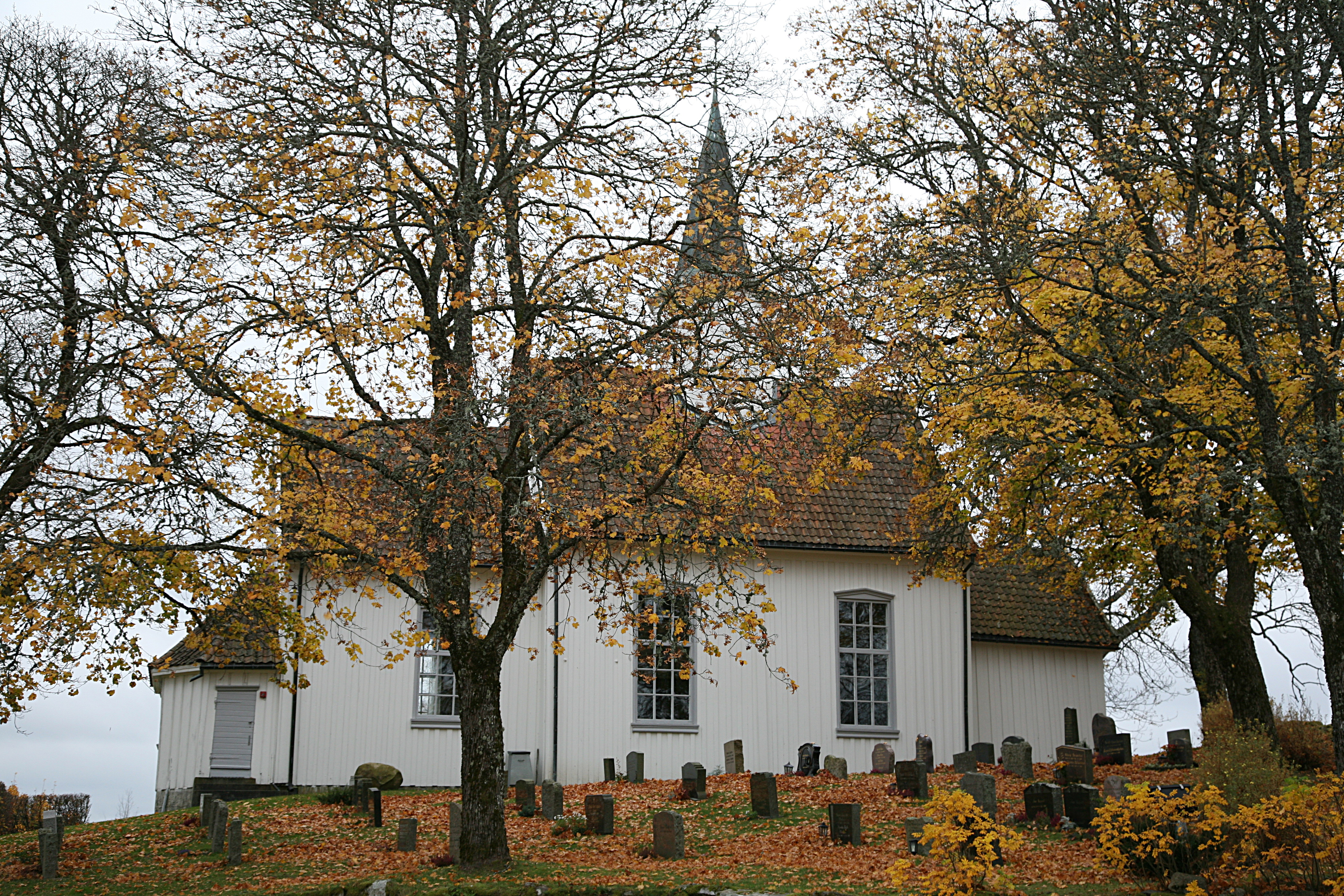 Hovin kirke. Church in Spydeberg, Østfold, Norway.